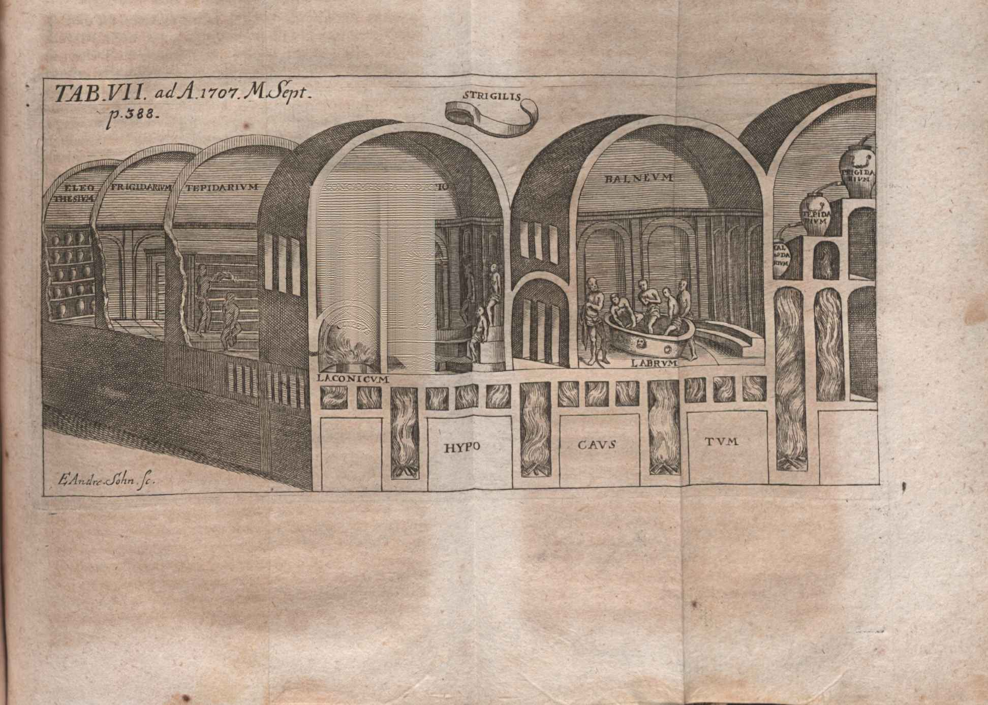 Illustration